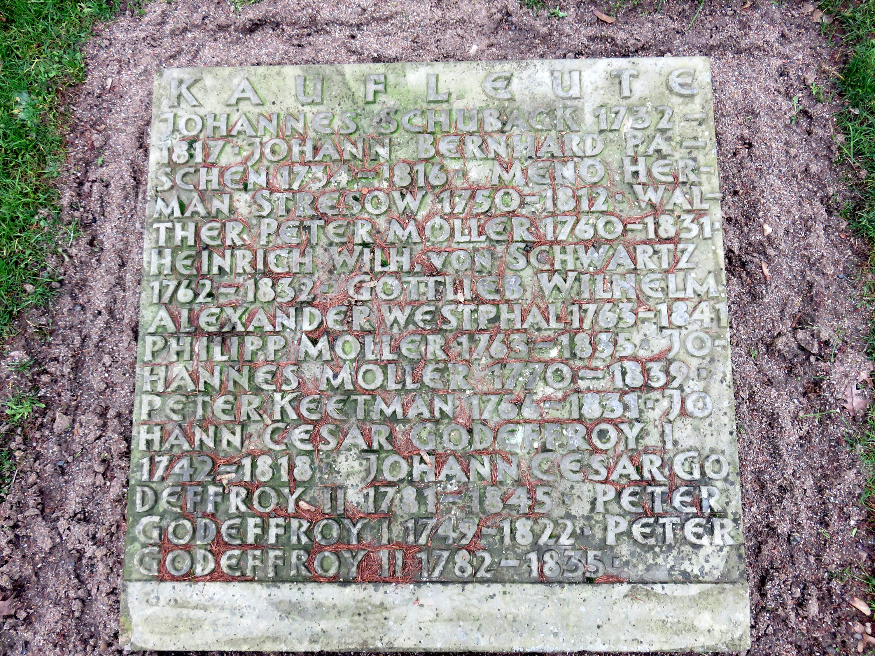 Sammelgrabmal Kaufleute im Bereich des Althamburgischen Gedächtnisfriedhofs auf dem Hamburger Friedhof Ohlsdorf, Rasenfläche südöstlich Querachse, zu Ehren von u. a. Johannes Schuback und Mitgliedern der Familie Godeffroy: Johann Cesar Godeffroy, Johann Cesar Godeffroy II, Peter Godeffroy (1749–1822) , Peter Godeffroy (1782–1835).